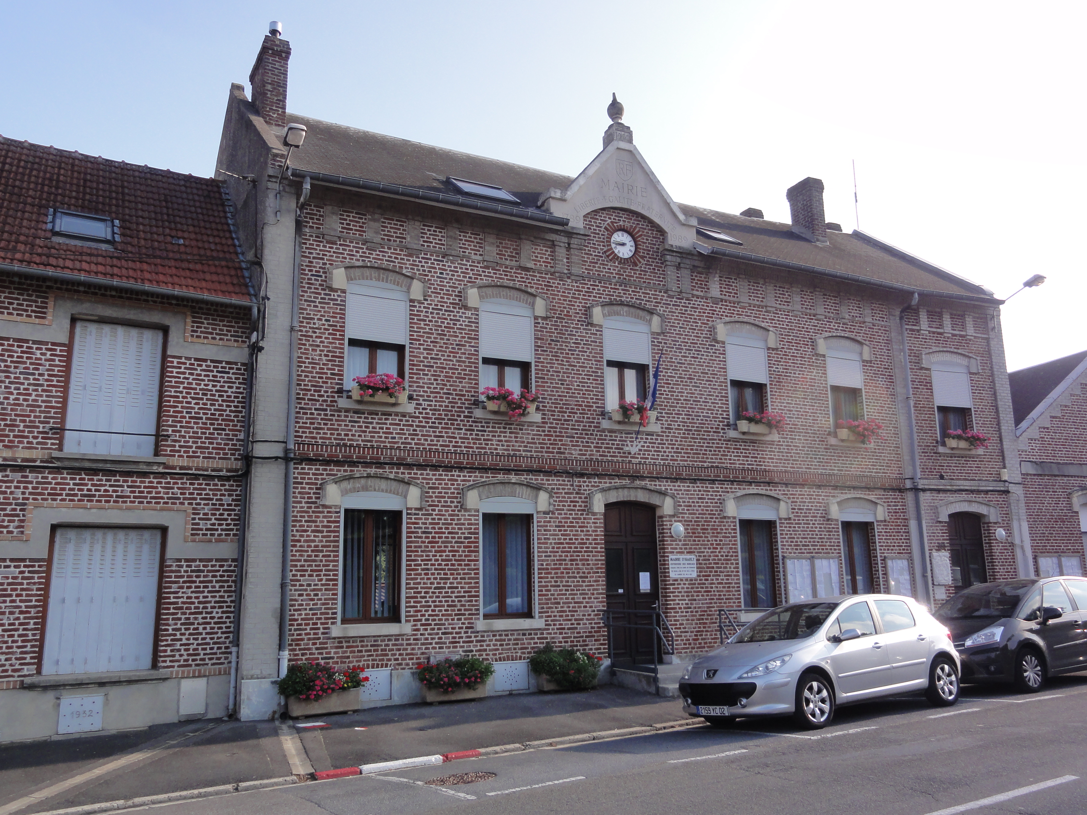 Harly (Aisne) mairie